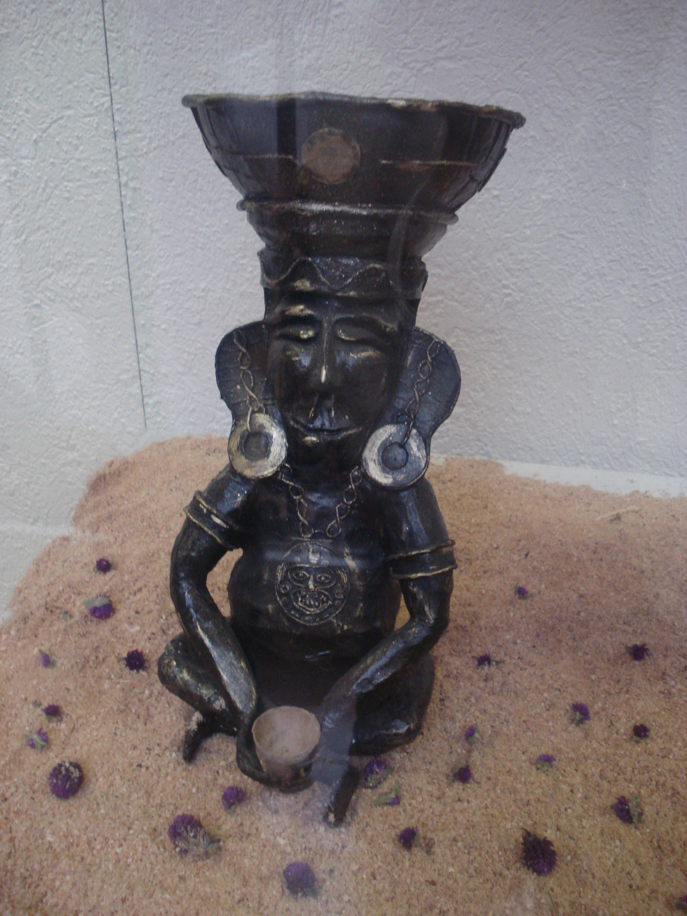 Idolo de piedra encontrado en la zona chinampero de San Andres Mixquic